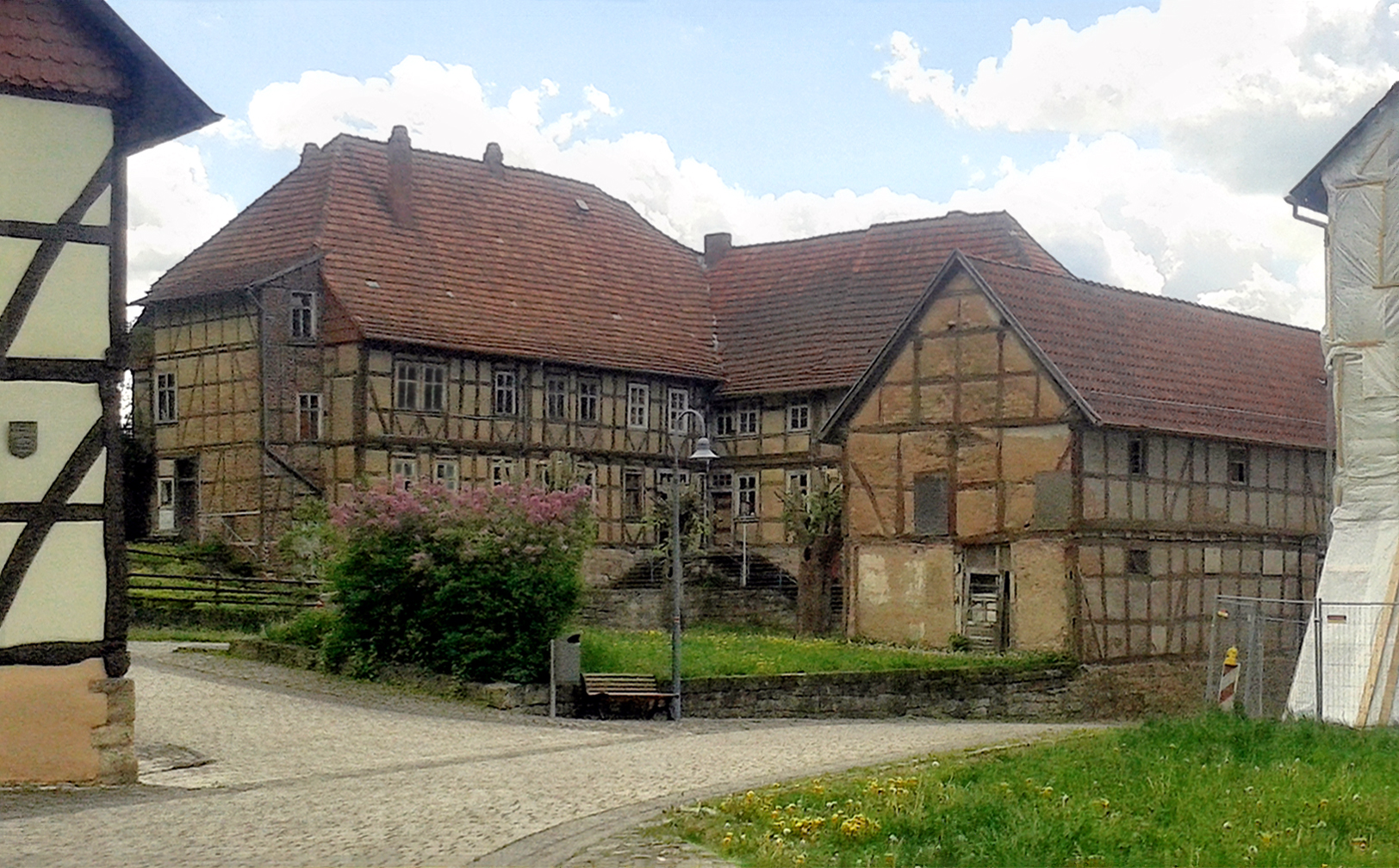 Der Mainzer Hof zu Treffurt im Mai 2015